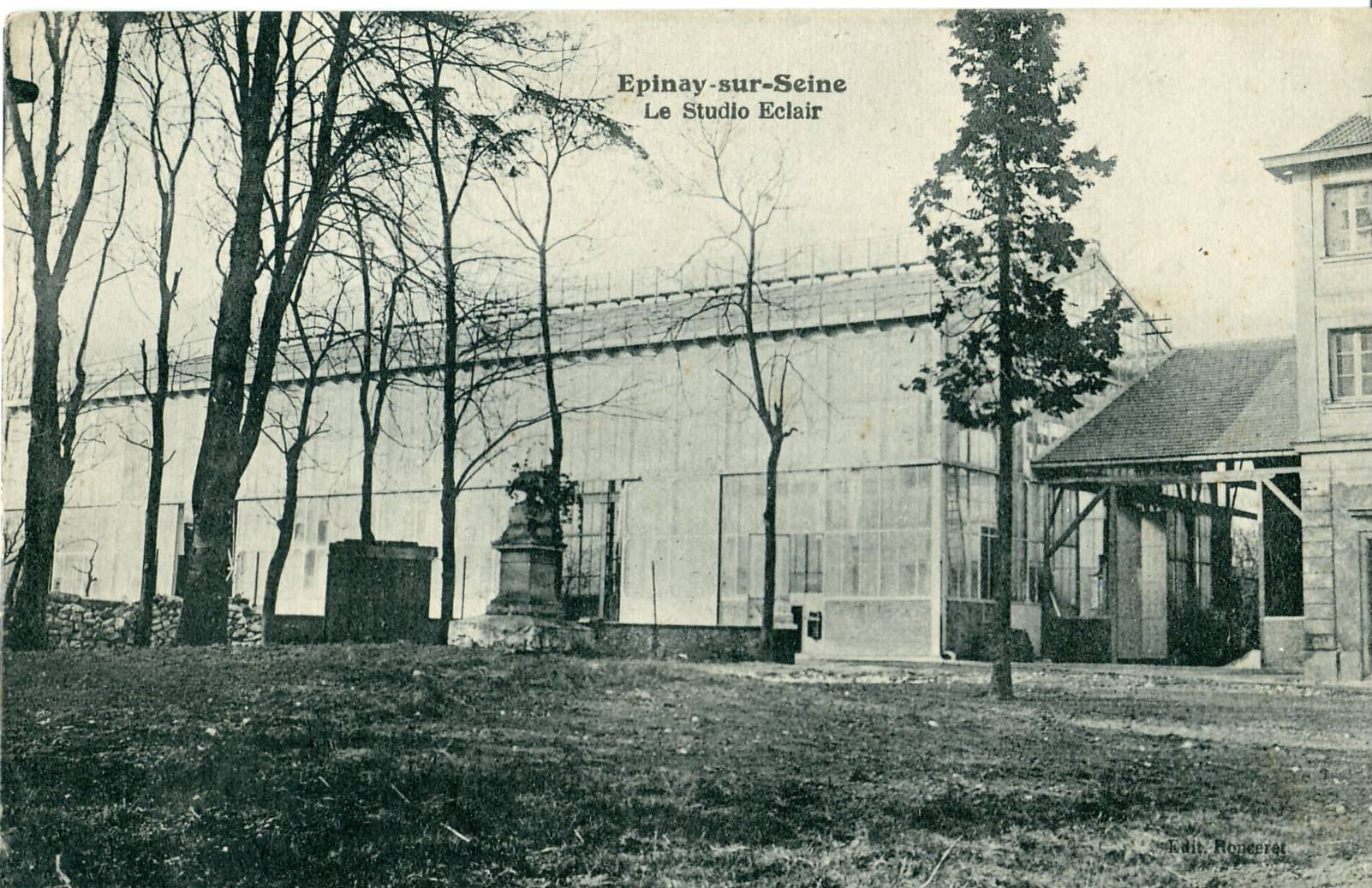 Carte postale ancienne éditée par Bouchetal & RoncerayLe Studio Éclair à Épinay-sur-Seine